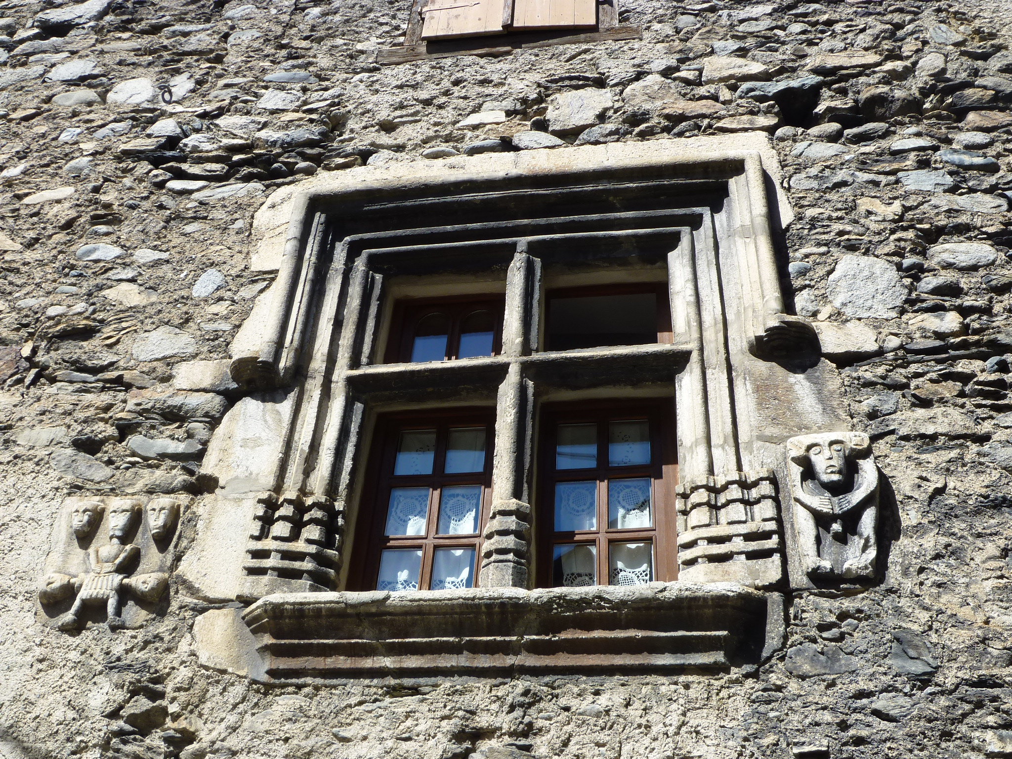 Casa Paulet d'Arties (Naut Aran): detall d'una finestra a la façana del carrer Major